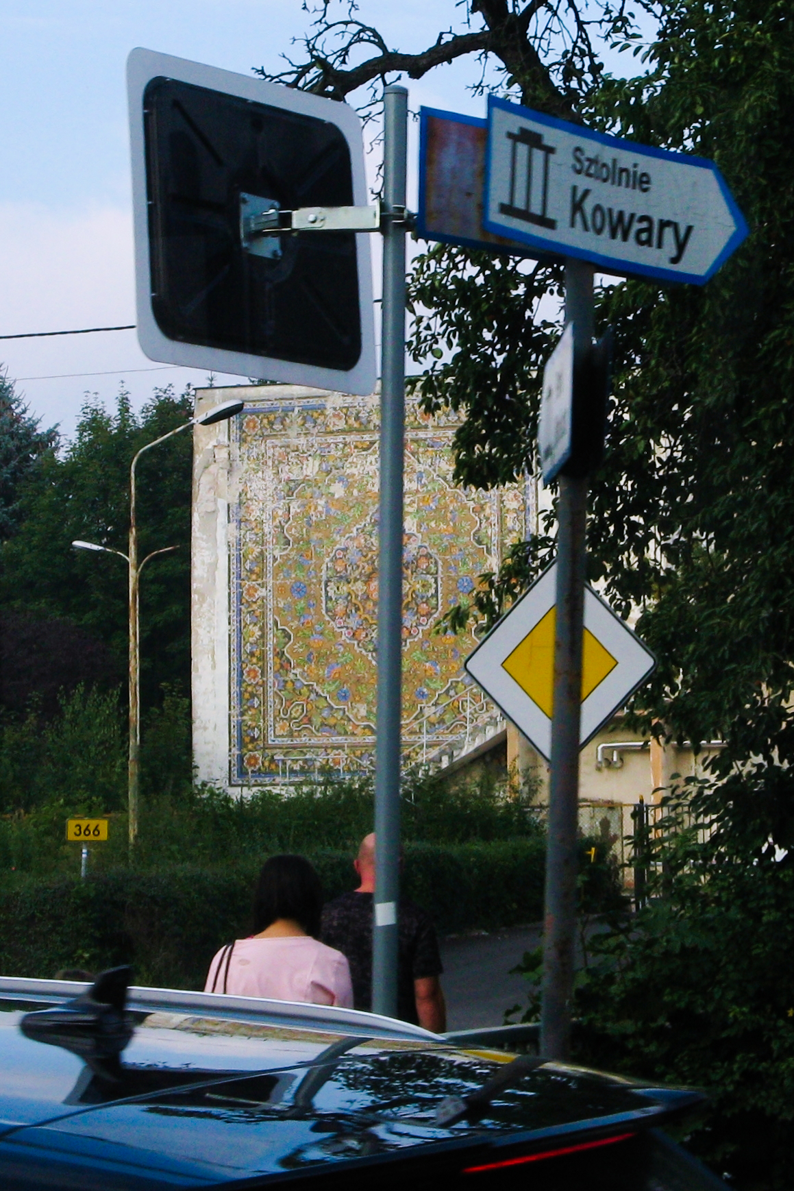 mozaika przedstawiająca dywan na ścianie hali dawnej Fabryki Dywanów w Kowarach na rogu ulic Zamkowej i Ogrodowej oraz znaki drogowe (widok z okna autobusu)